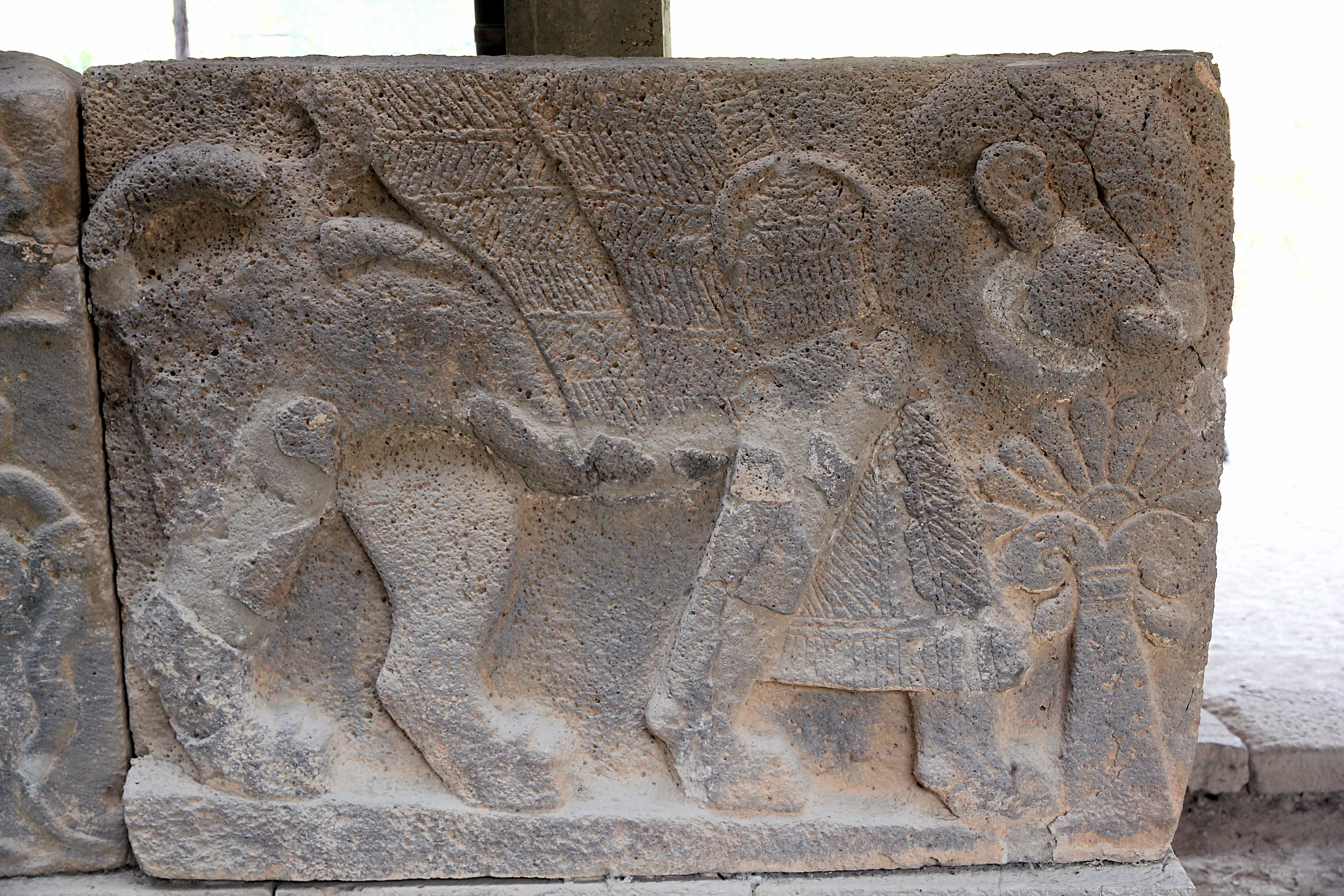 Karatepe (Asatiwataya), neo-hethitischer Fundort bei Osmaniye, Südtürkei, Nordtor, rechte Kammer, Relief NKr 1